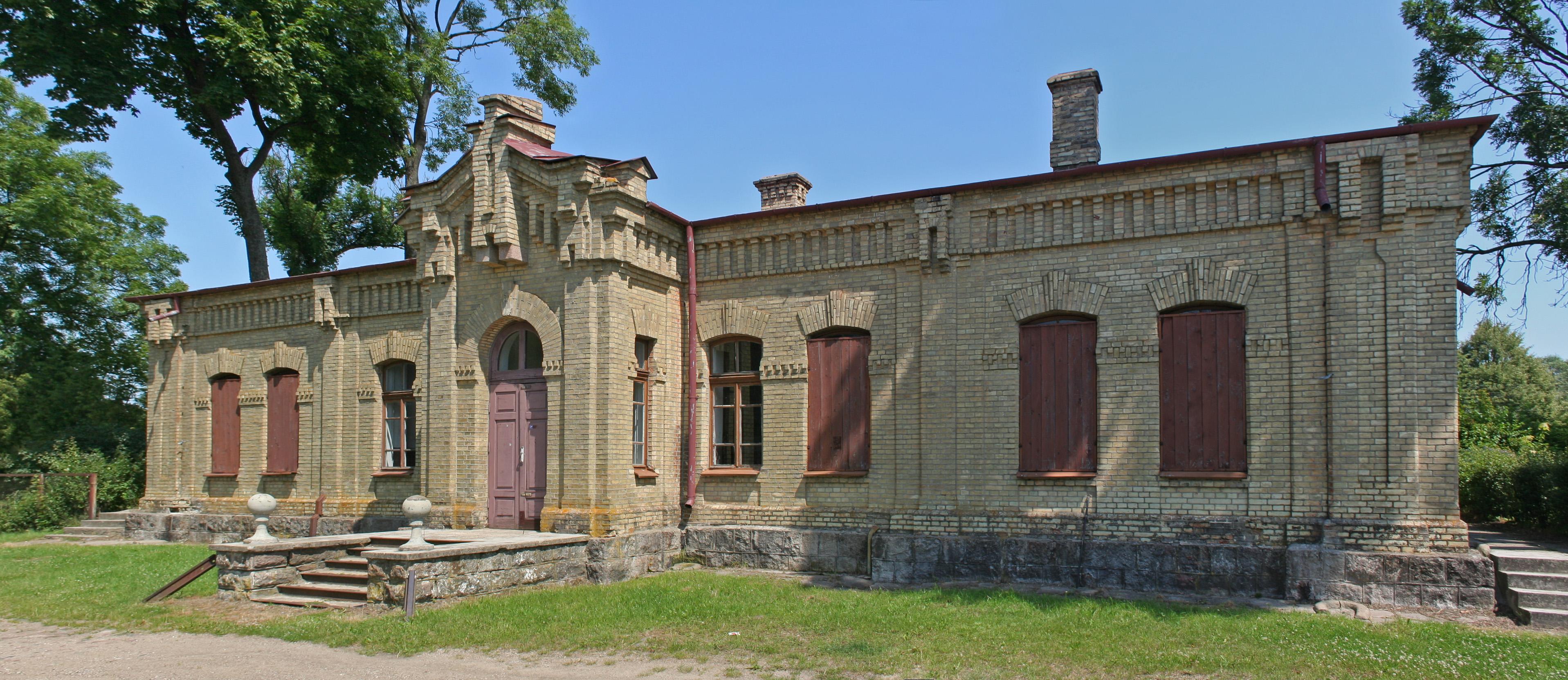 Dworzec kolejowy we wsi Nowa Kamienna.